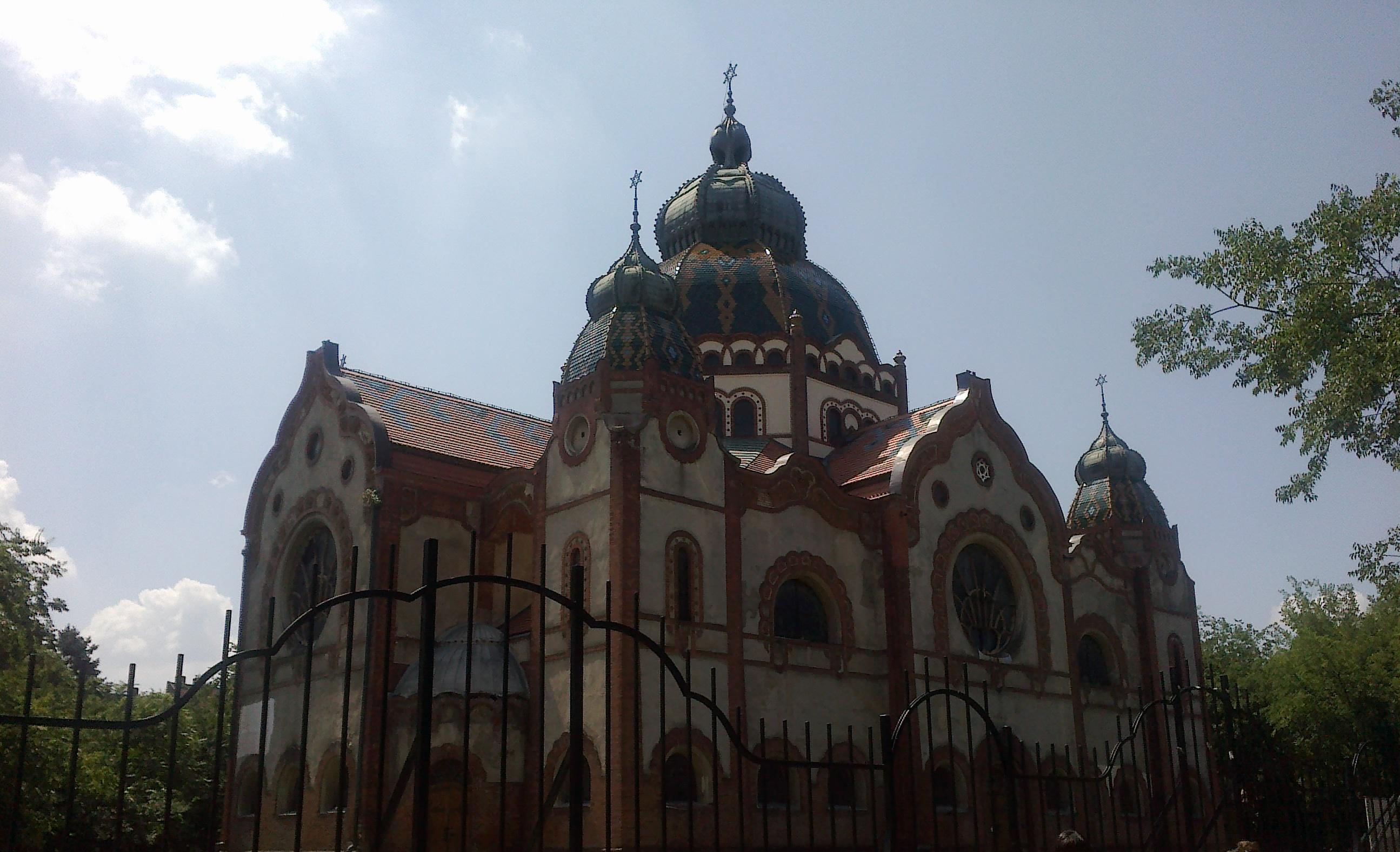 Szabadkai zsinagóga